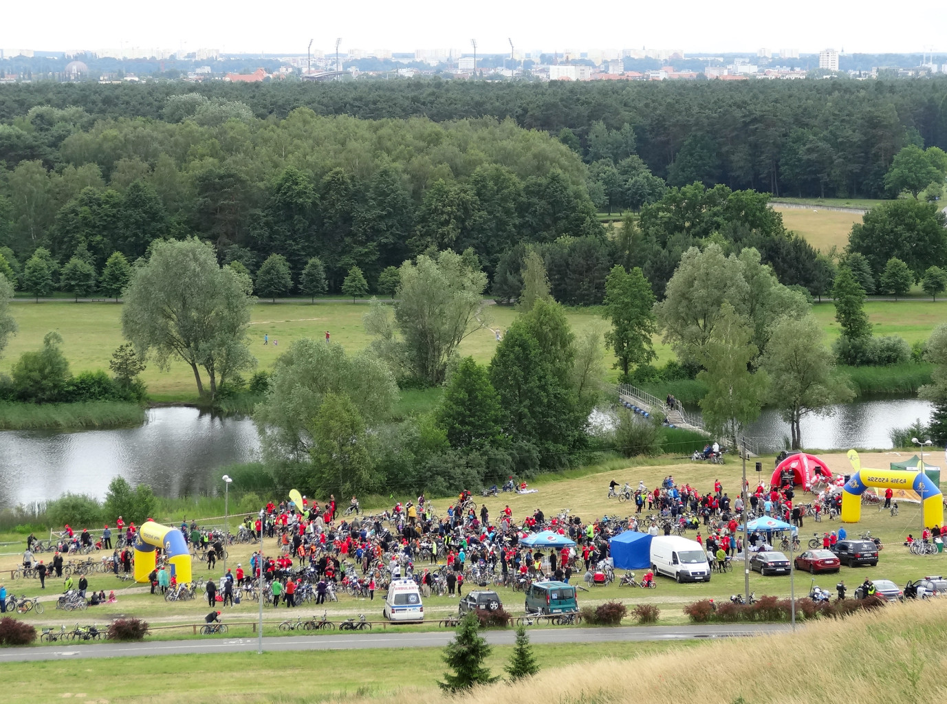 Rajd rowerowy Galerii Pomorskiej 2014 - meta w Leśnym Parku Kultury i Wypoczynku w Bydgoszczy